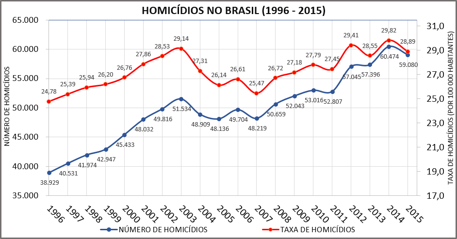 Homicídios no Brasil de 1996 a 2015. Fonte dos dados